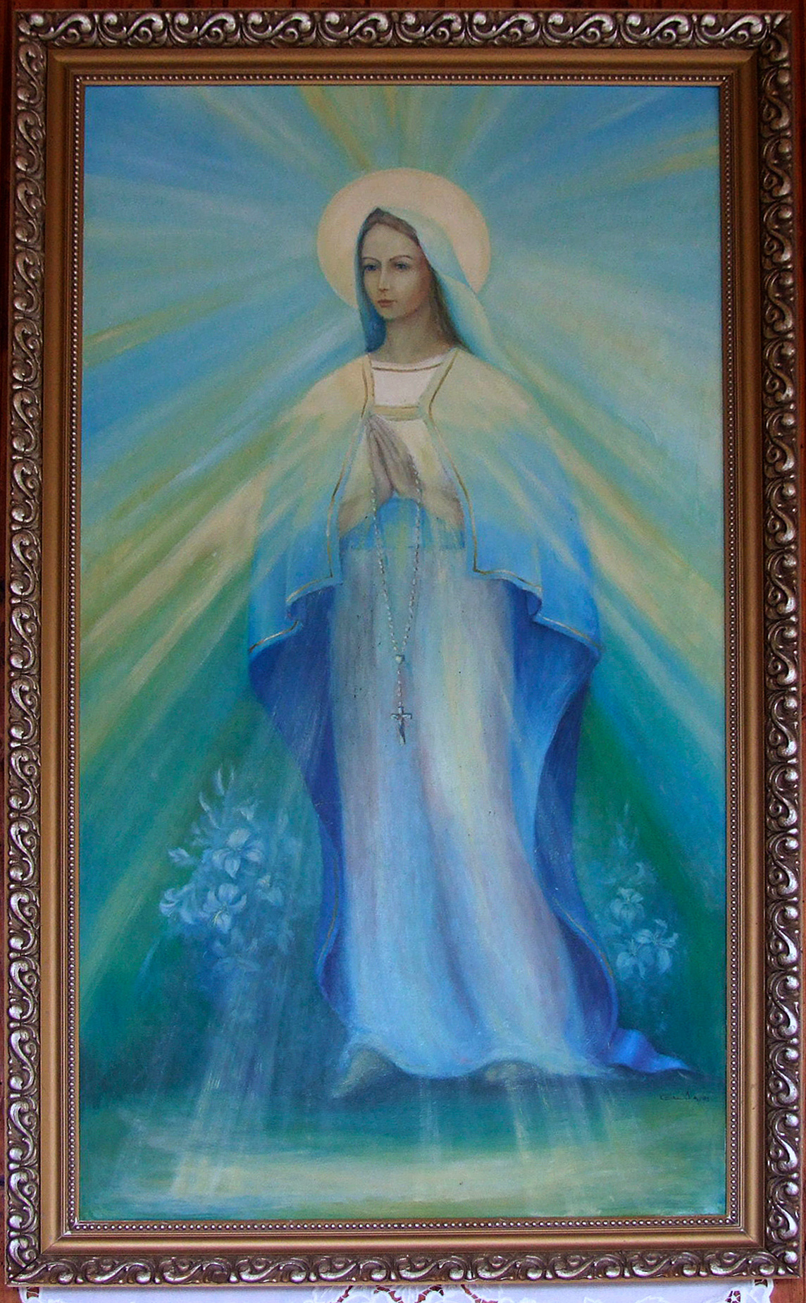 Matka Boska Litmanowska